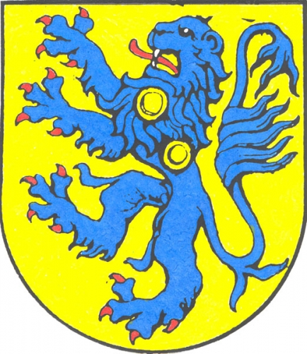 znak, Nemojov, okres Trutnov